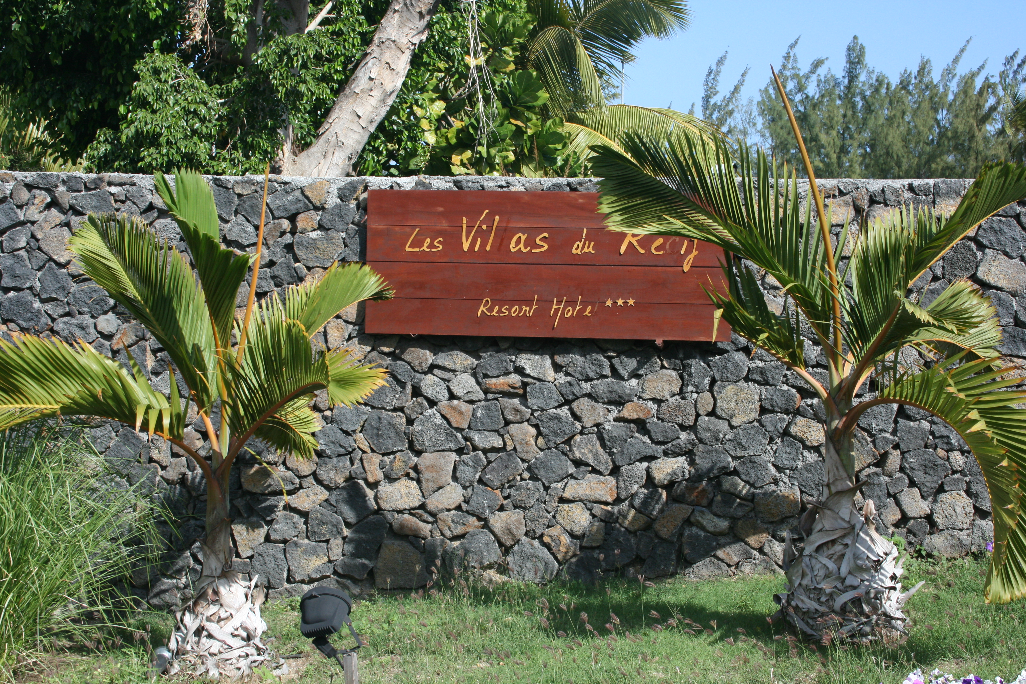 Plaque à l'entrée des Villas du Récif, un hôtel de Saint-Gilles, à la Réunion